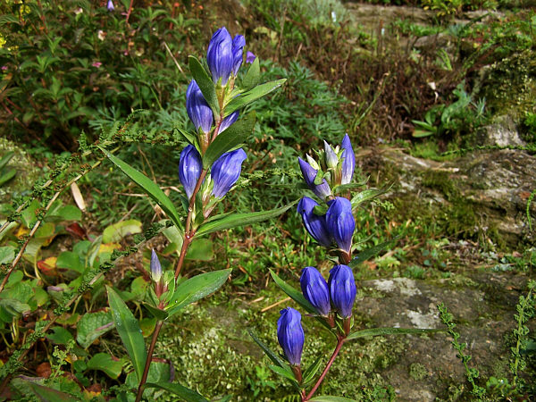 Gentiane du Japon (Kuriles, Sakhalin), de 30 à 70 cm, sur pelouses alpines. (photo en culture)